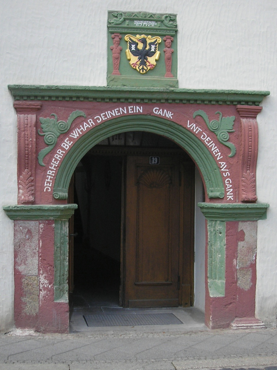 Das Portal des Rathauses in Mühlhausen (Thüringen).